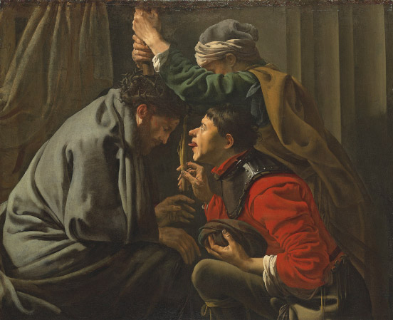 Die Verspottung Christi